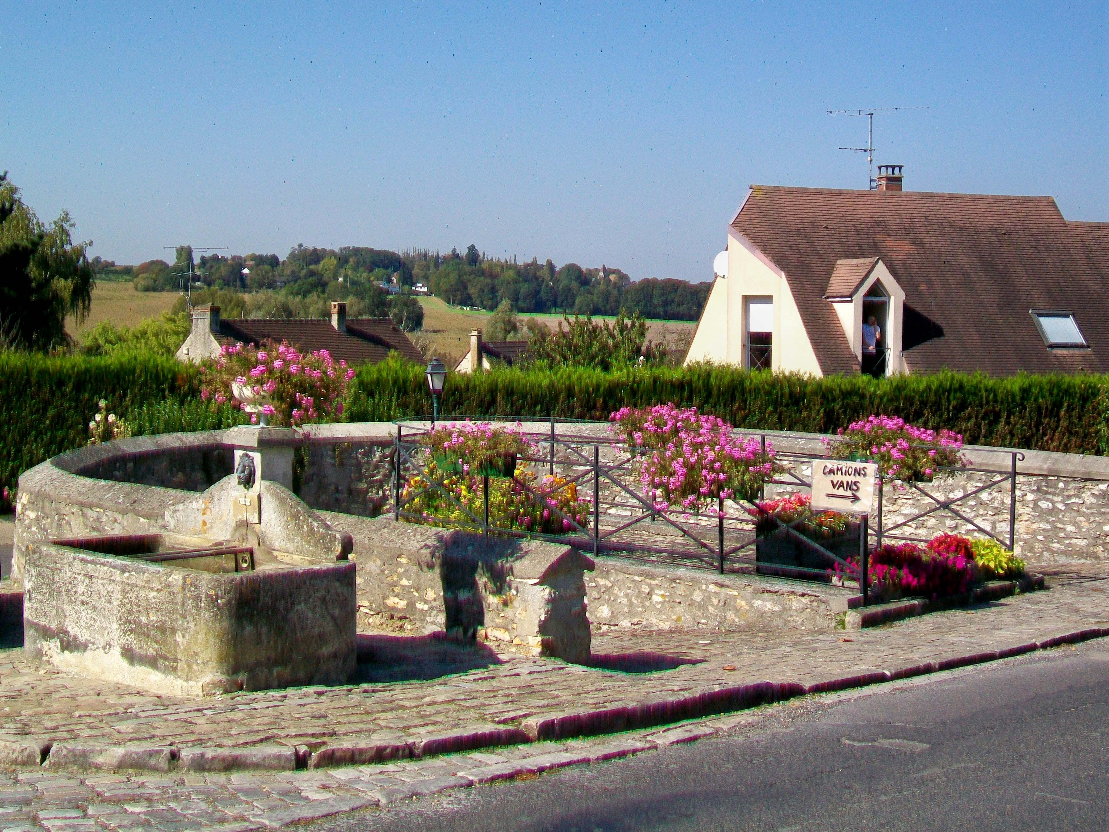 Fontaine-abreuvoir et lave-sabots (pédiluve), rue de la Vieille France.